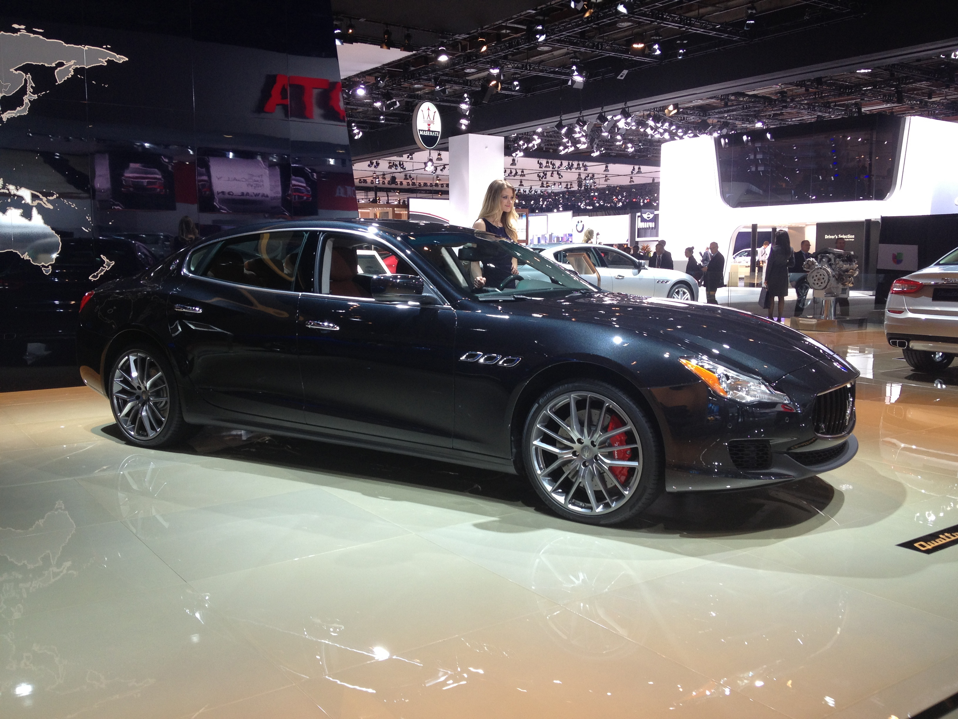 Maserati Quattroporte VI (2013) al Salone dell'automobile di Detroit (North American International Auto Show) 2013 in Michigan. Blu presidenziale. dietro il motore Maserati-Ferrari progettato appositamente per questo veicolo